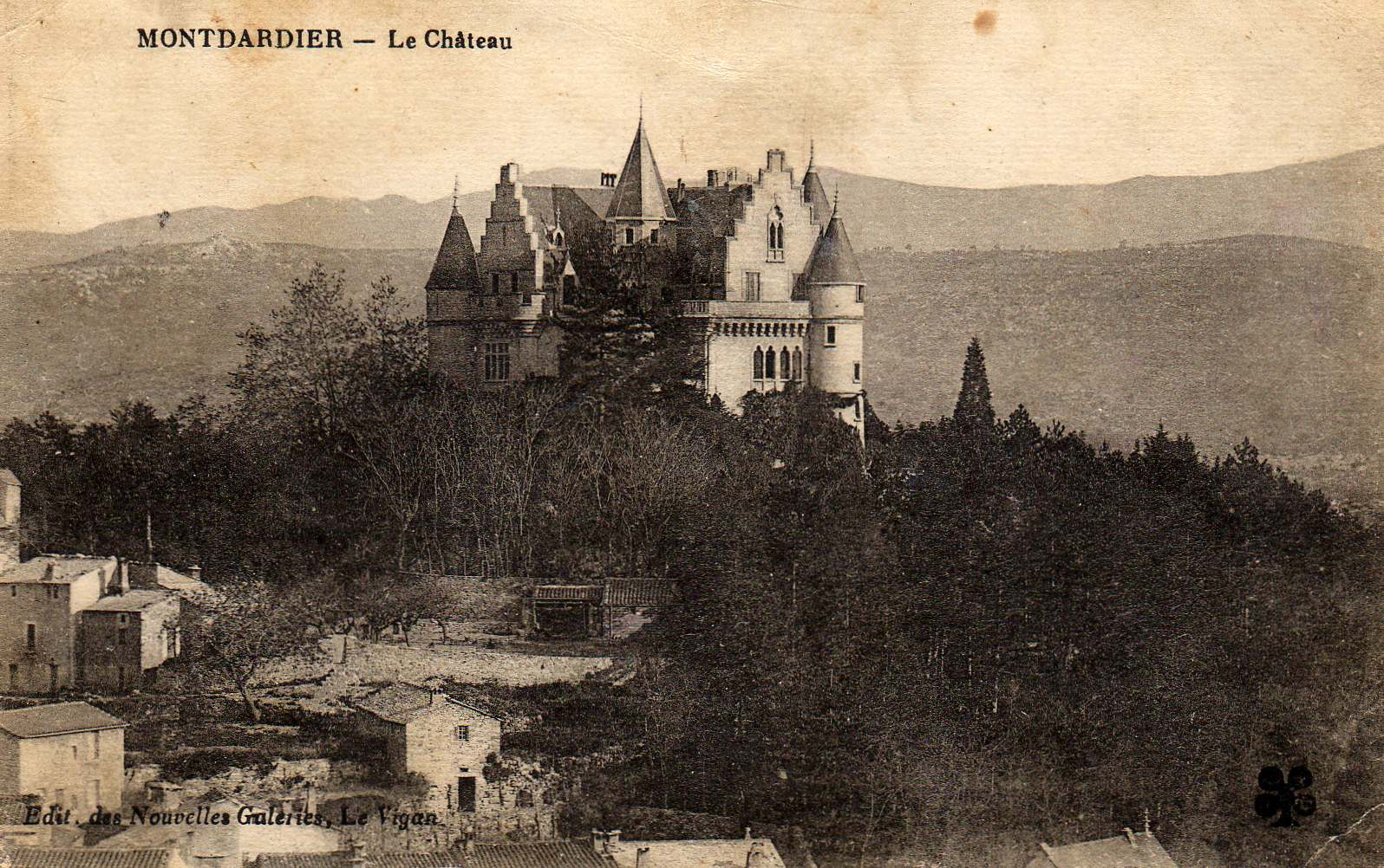 vue du chateau de Montdardier, carte postale ancienne